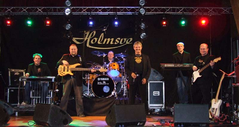 Holmsve